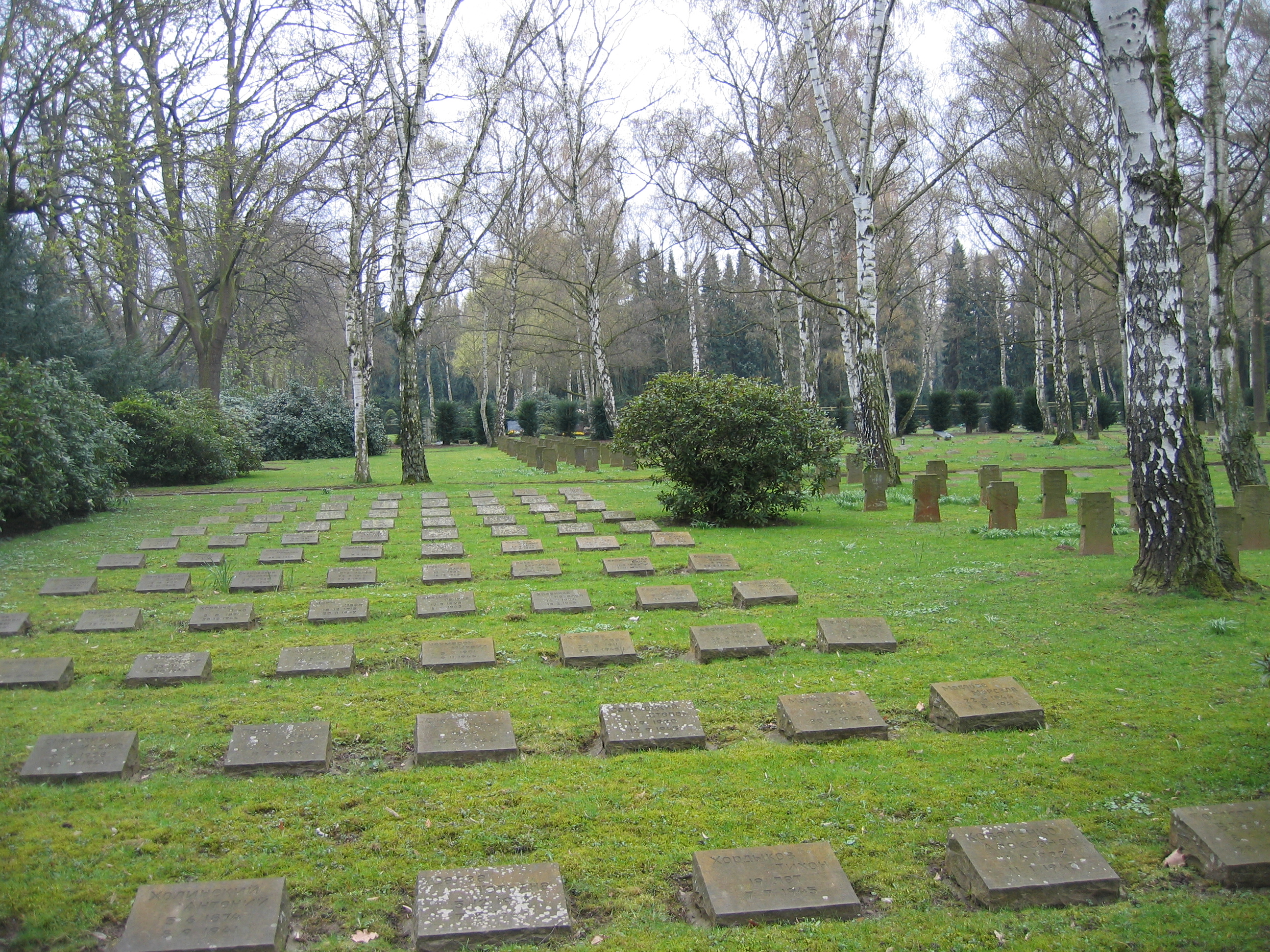 Bonner Nordfriedhof, Ehrenhain